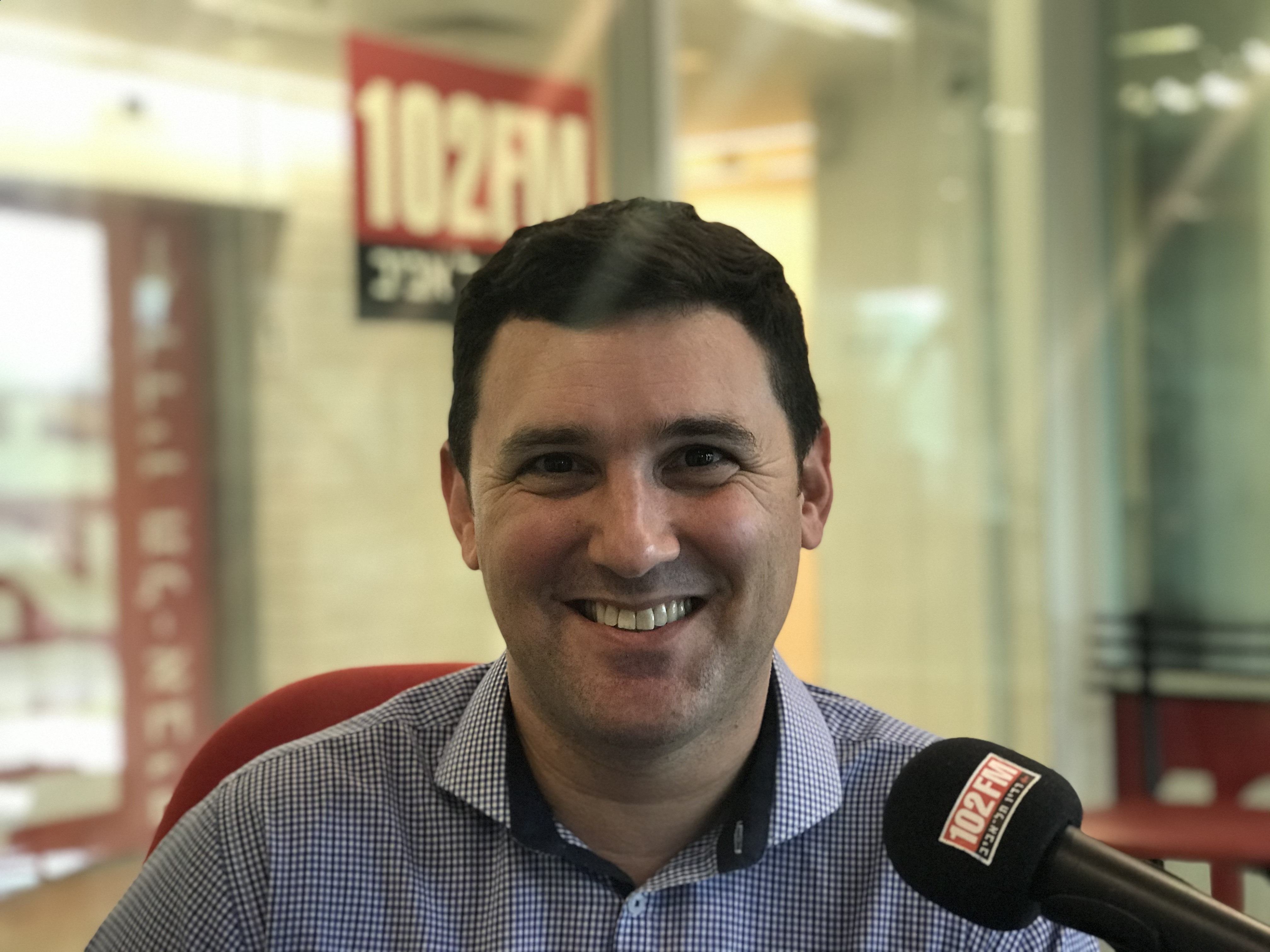 ח"כ איתן גינזבורג באולפן פרלמנט שישי ברדיו תל אביב